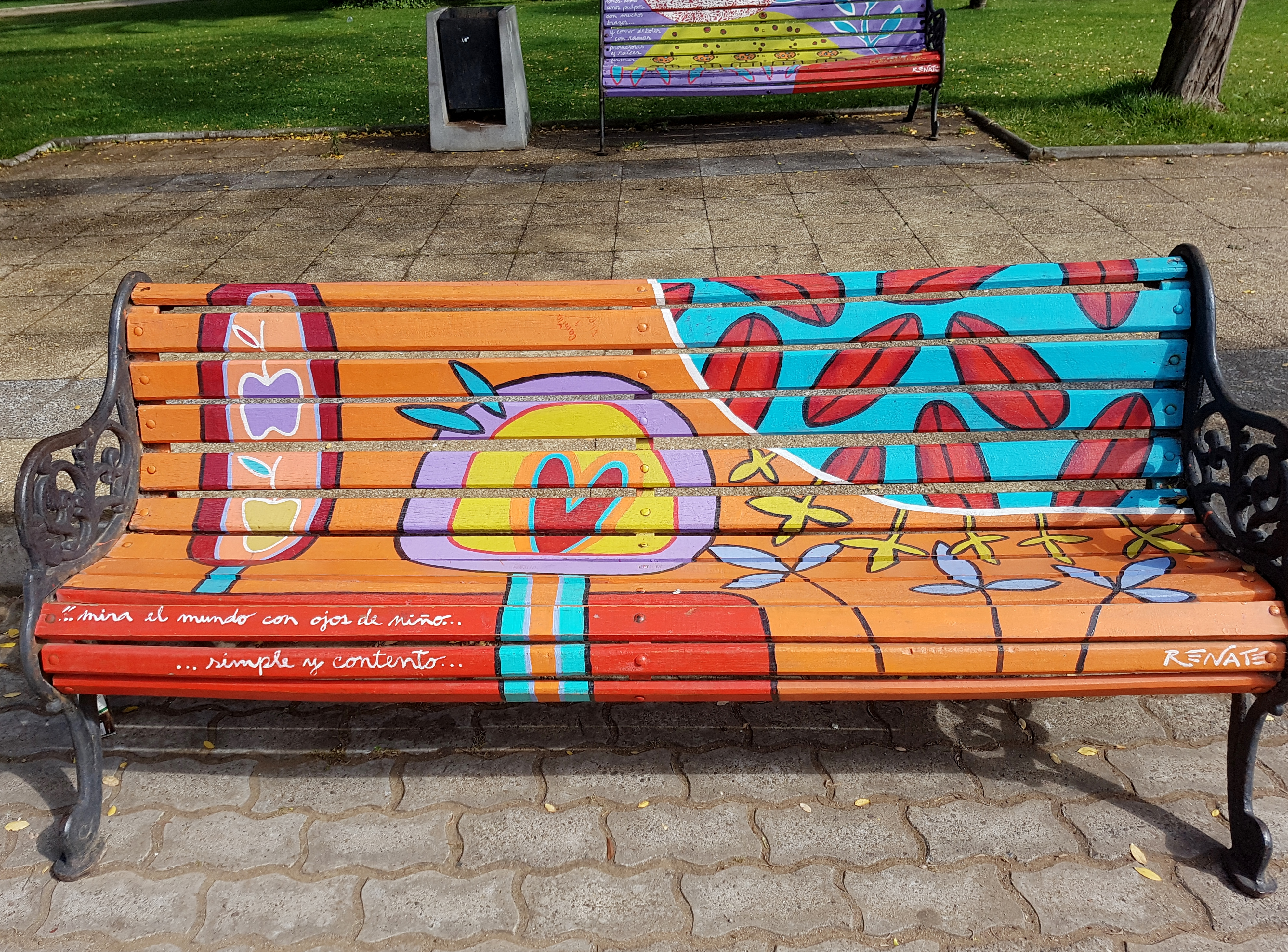 Bancas pintadas por Renate Neumann en la plaza de Papudo, Chile.